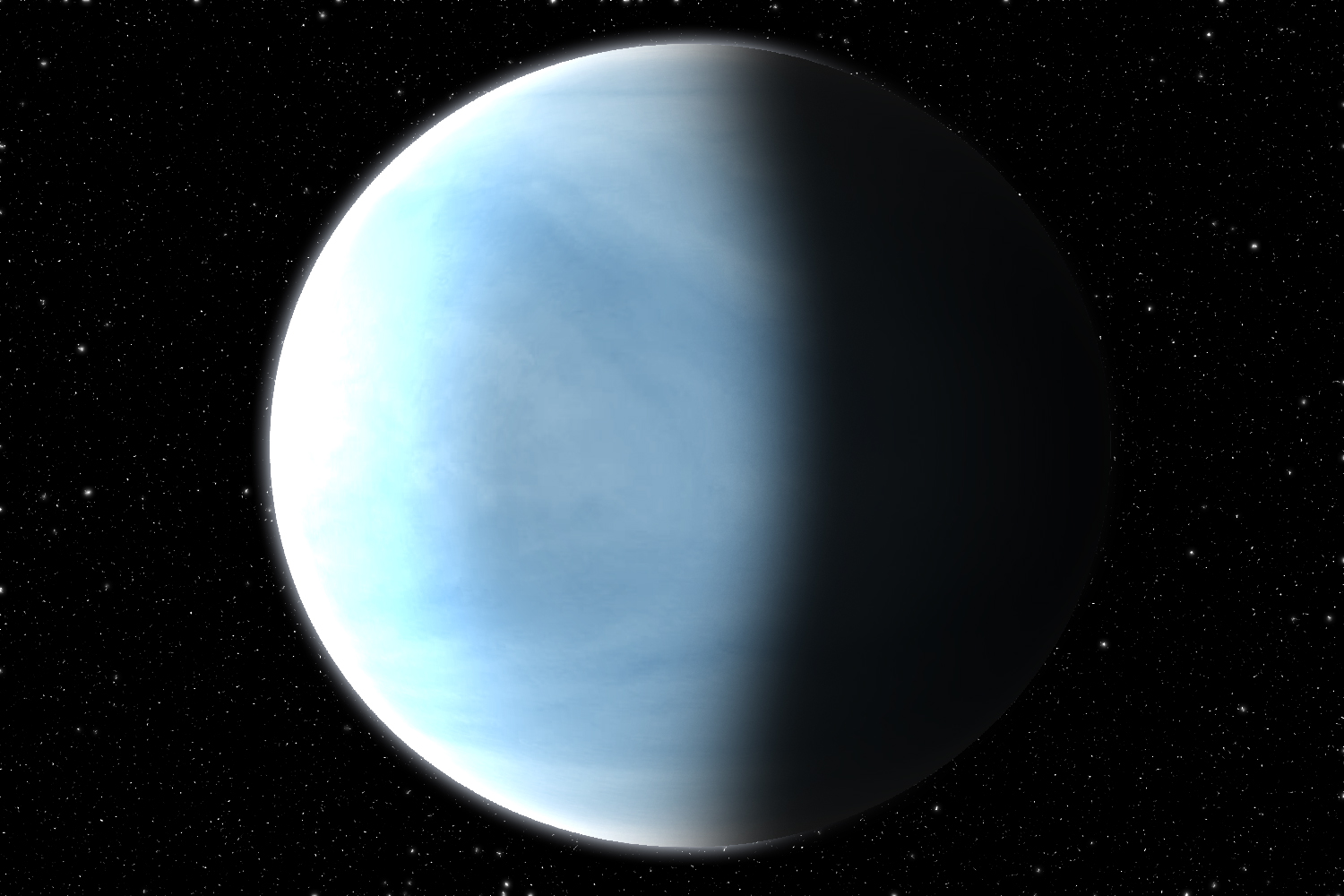 Posible aspecto de Kepler-283c